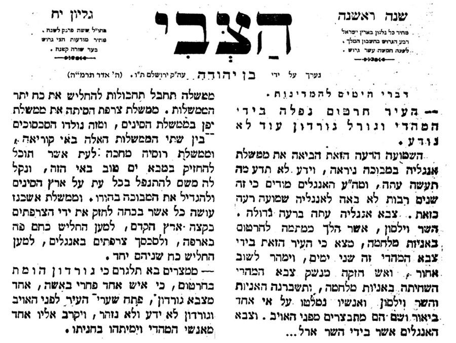 ידיעה בעיתון 'הצבי' על פרשת מותו של גורדון